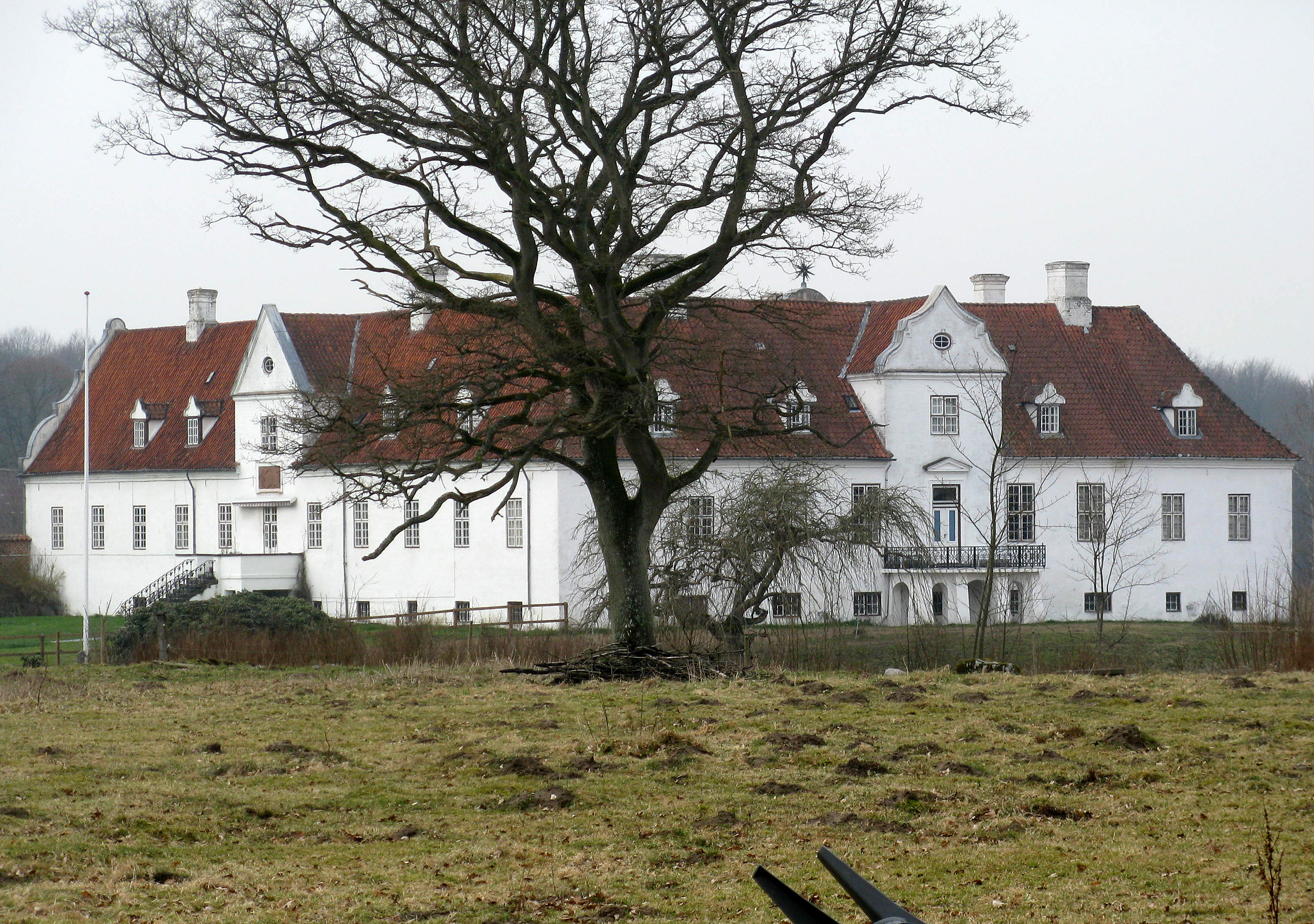 Bidstrup er en gammel hovedgård, som ligger i Granslev Sogn, før Kommunalreformen 1970 lå sognet i Houlbjerg Herred i Viborg Amt, nu ligger sognet i Favrskov Kommune. Hovedbygningen er opført 1698-1760.